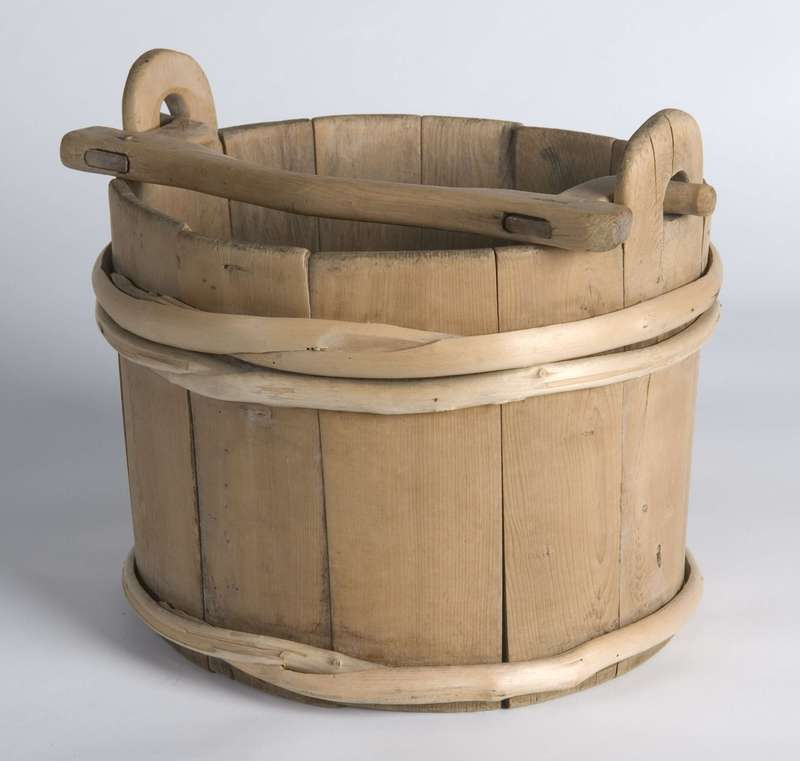 Lagget melkebøtte i furu datert 1862 fra Ørsta i Møre og Romsdal. Bøtta har innskrift: L.L.S. STEINNES 1862. Diameter 24 cm. Foto Anne-Lise Reinsfelt /Norsk Folkemuseum NFL.00571